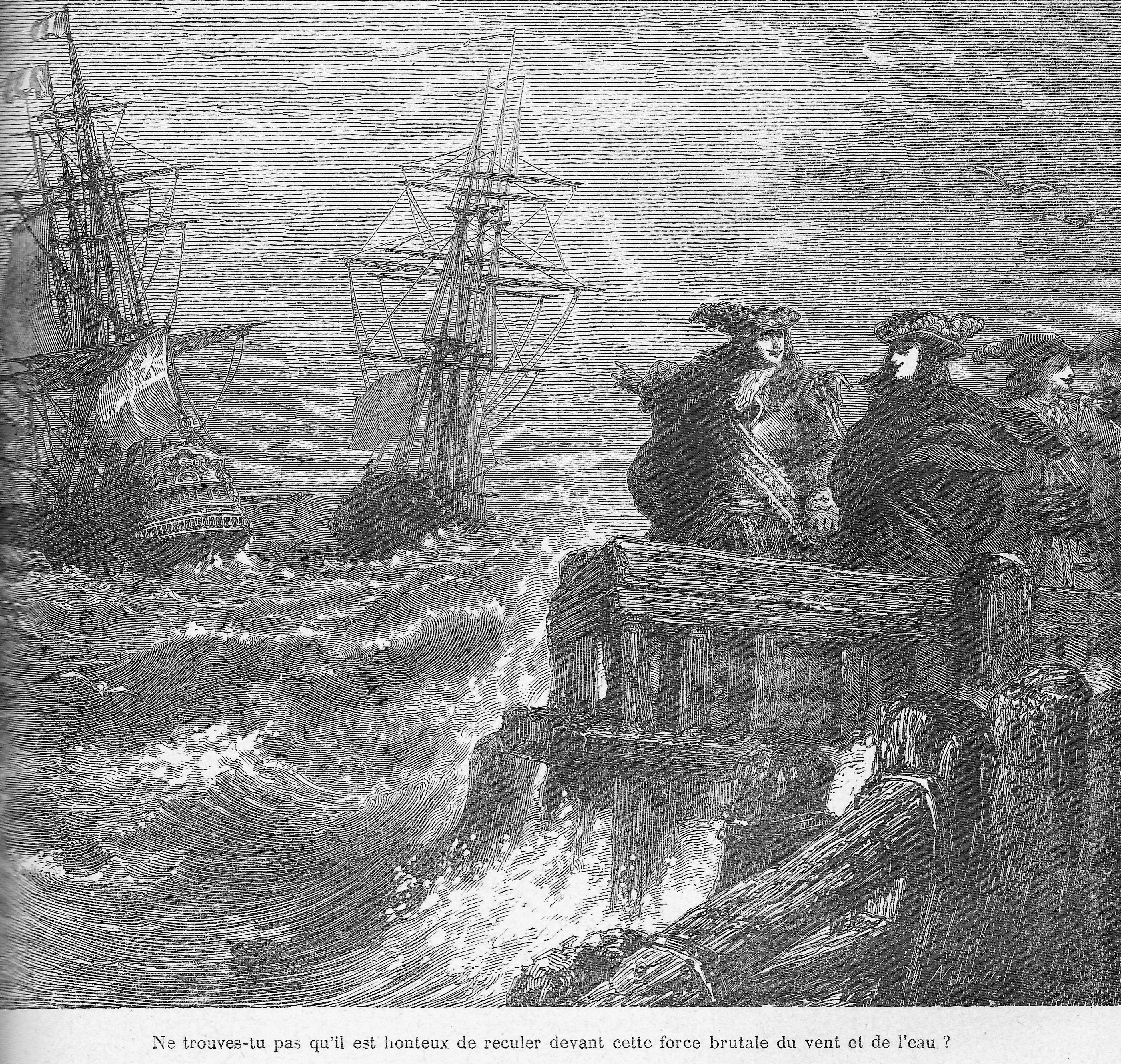 Gravure illustrant une édition ancienne du Vicomte de Bragelonne d’Alexandre Dumas père. La gravure est signée A. de Neuville (cf. angle inférieur droit), nom du reste indiqué sur la page de titre, en même temps que celui de J. Désandré, comme étant le co-auteur des illustrations. Cette édition du roman, publiée à Paris par la maison d’édition A. Le Vasseur et Cie, établie au n° 33 de la rue de Fleurus à Paris, ne porte aucune date. Cependant l’ouvrage paraît assez ancien (XIXe siècle ?). Numérisation et téléversement légaux, m’a-t-il donc semblé. Les deux personnages représentés sont le comte de Guiche (celui de gauche, pointant du doigt la mer et les vaisseaux) et le vicomte Raoul de Bragelonne (à droite, l'air flegmatique).